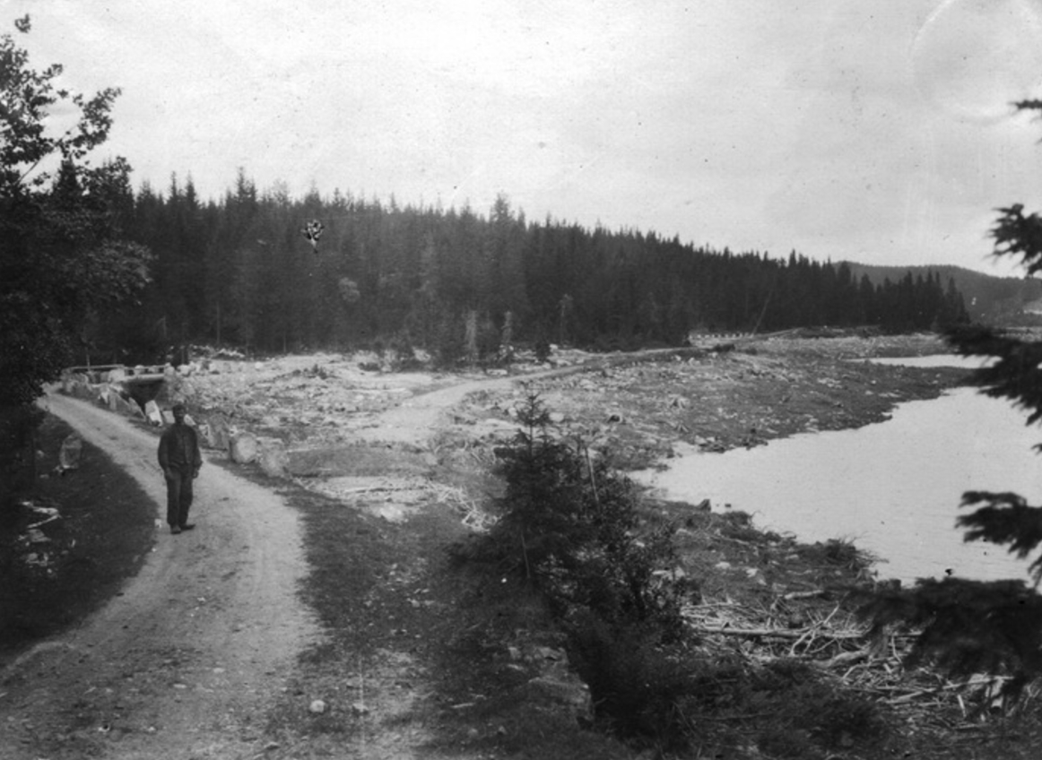 Traseen til Greveveien ved Ørfiske ble lagt om noe tidlig på 1900-tallet da vannet ble demmet opp. Ukjent fotograf, ca. 1916. Fra Oslo byarkivs samling.